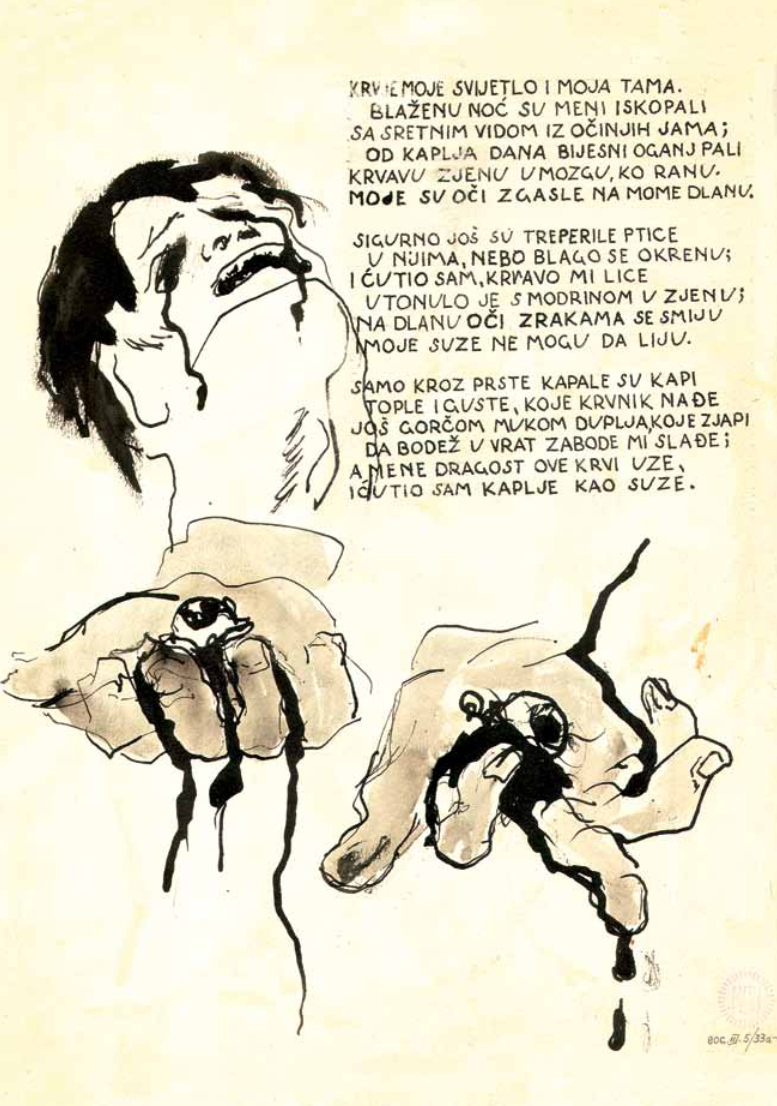 Srpskohrvatski / српскохрватски: Izvod iz poeme "Jama" I. G. Kovacica, napisane 1942. s ilustracijama slikara-partizana Z. Price i E. Murtica.